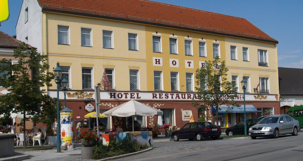 Traditionsreiches Hotel "Post" direkt am Stadtplatz in Schrems.